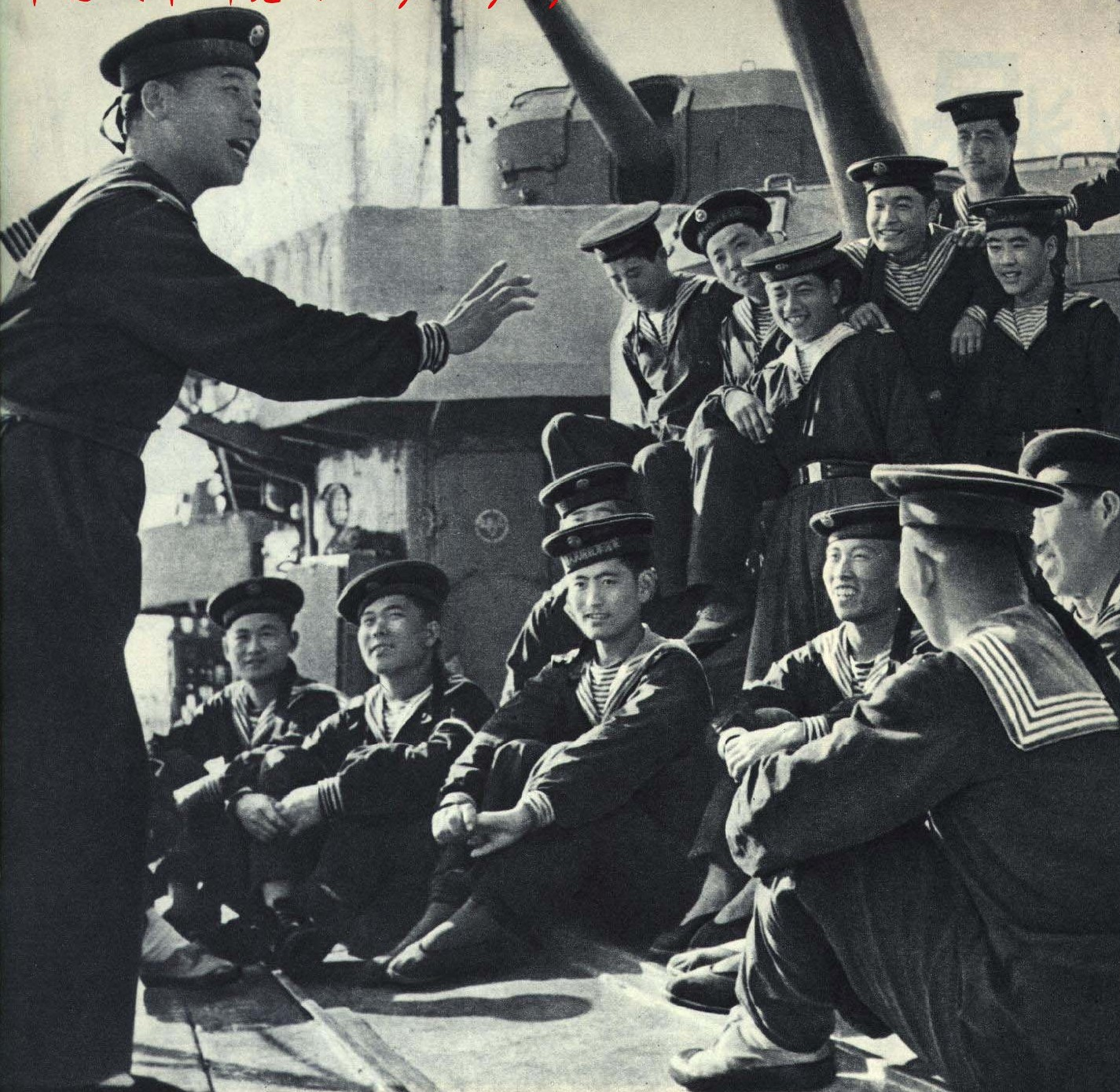 1963-01 1963年 中国人民解放军海军士兵